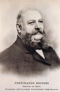 Ferdinando Bocconi (1836-1908)